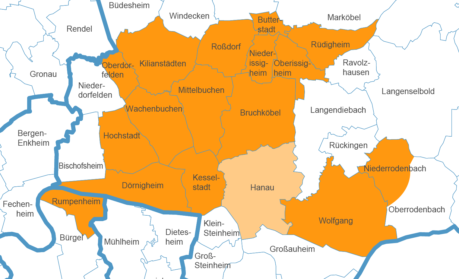 Karte der Ausmaße des Amtes Büchertal der Grafschaft Hanau, dargestellt in den Gemarkungen heutiger Gemeinden bzw. Ortsteile. Nicht berücksichtigt sind Wüstungen, die heute innerhalb der Ortsteilgemarkungen bestanden. Die Stadt Hanau gehörte nicht zum Amt, wohl aber einige in der heutigen Gemarkung liegenden Wüstungen, weshalb die Gemarkung halbtransparent dargestellt wurde. Anm. Die Germakrungsgrenze zwischen Nieder- und Oberrodenbach ist undeutlich.